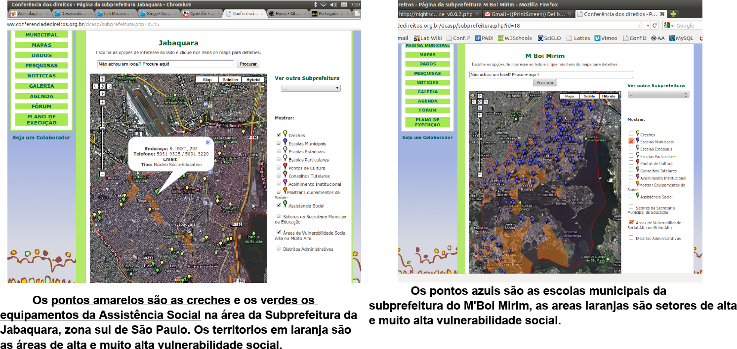 Captura de tela do sistema desenvolvido no e por Renato Fabbri em conjunto com Cleodon Silva